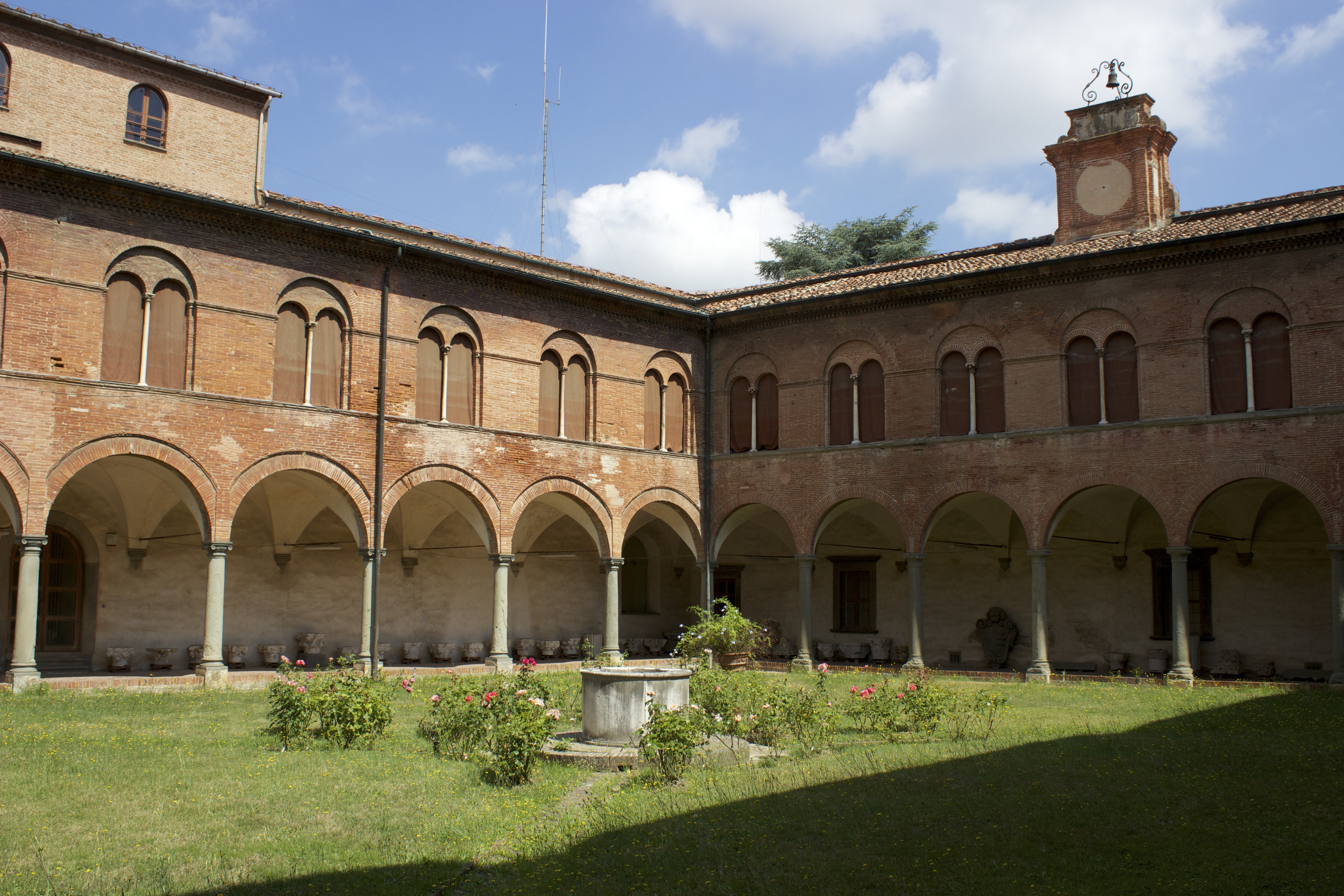 Pisa. Museo di San Matteo. Claustro.